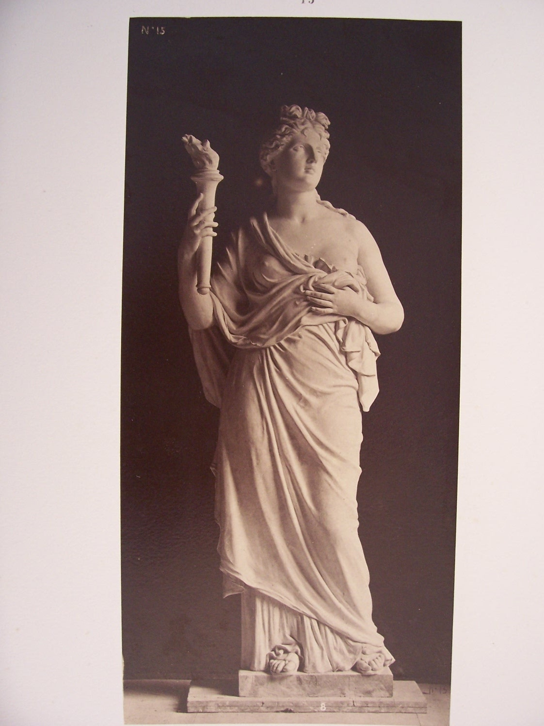 Le Nouvel Opéra de Paris. Statues décoratives (35 planches) Statues dans le Grand Foyer: Planche 15: La Passion (par Debut)